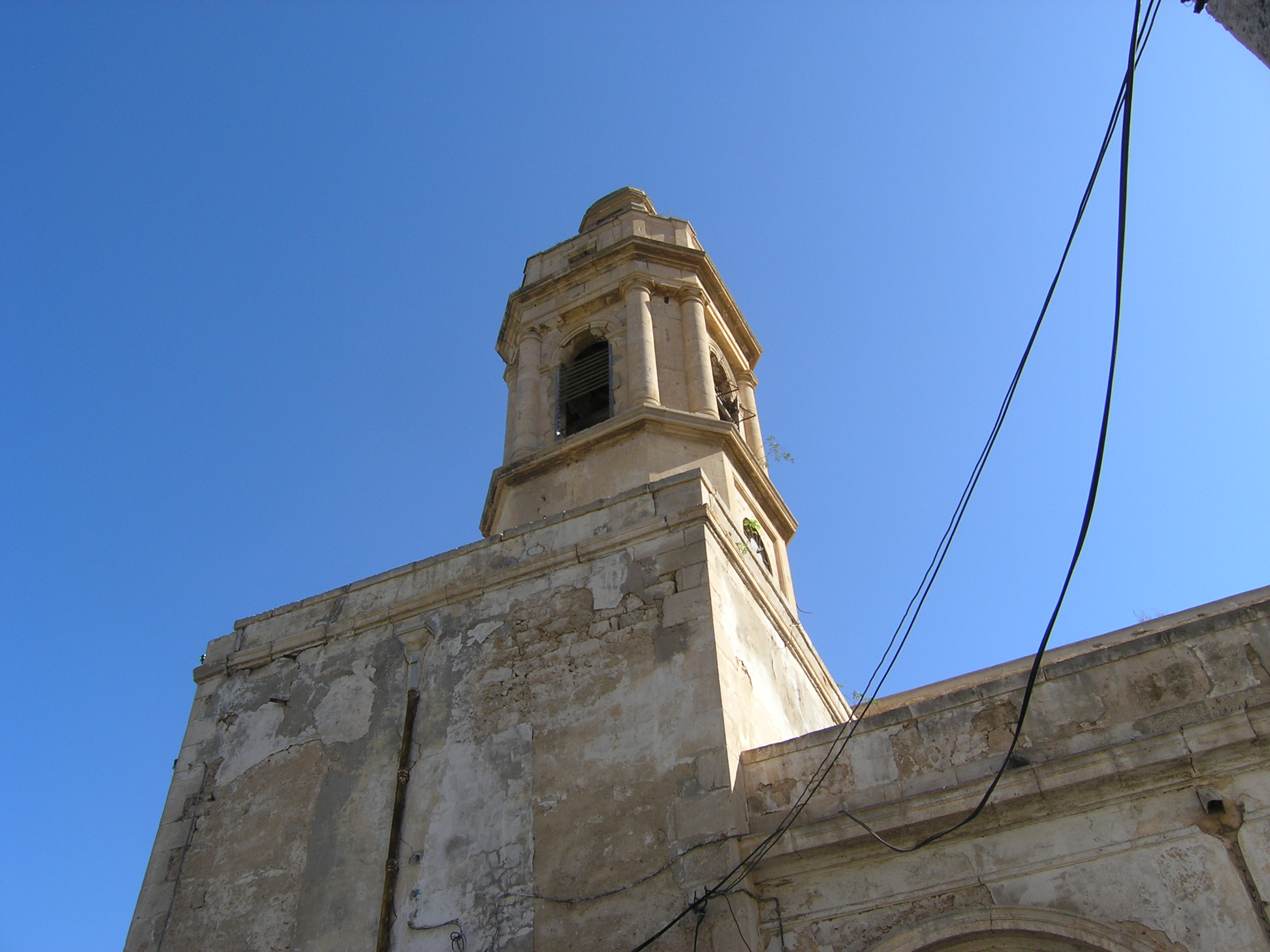 sur le mont aidour murdjajou eglise Oran Algérie